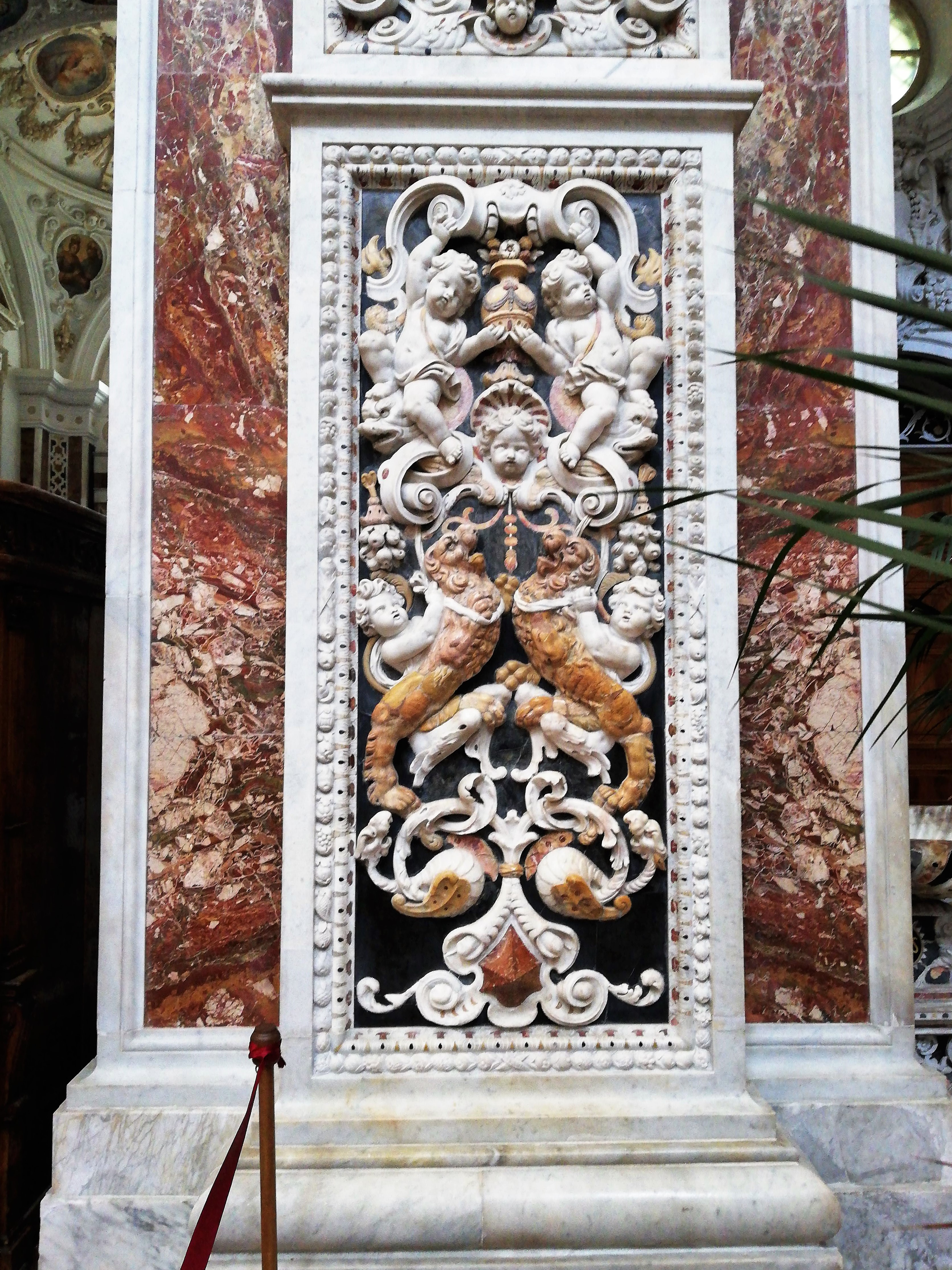 Marmi mischi.